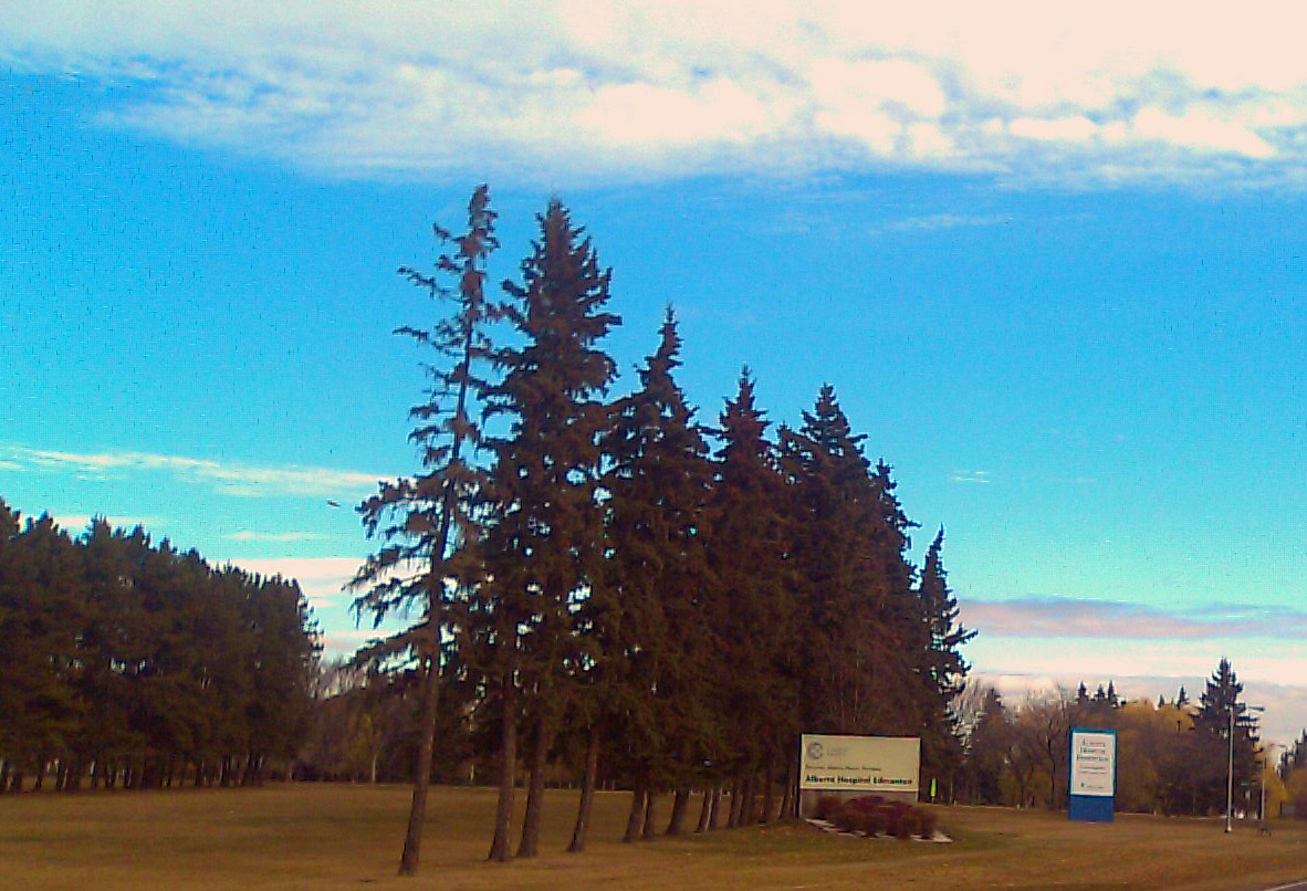 Alberta Hospital Edmonton main entrance